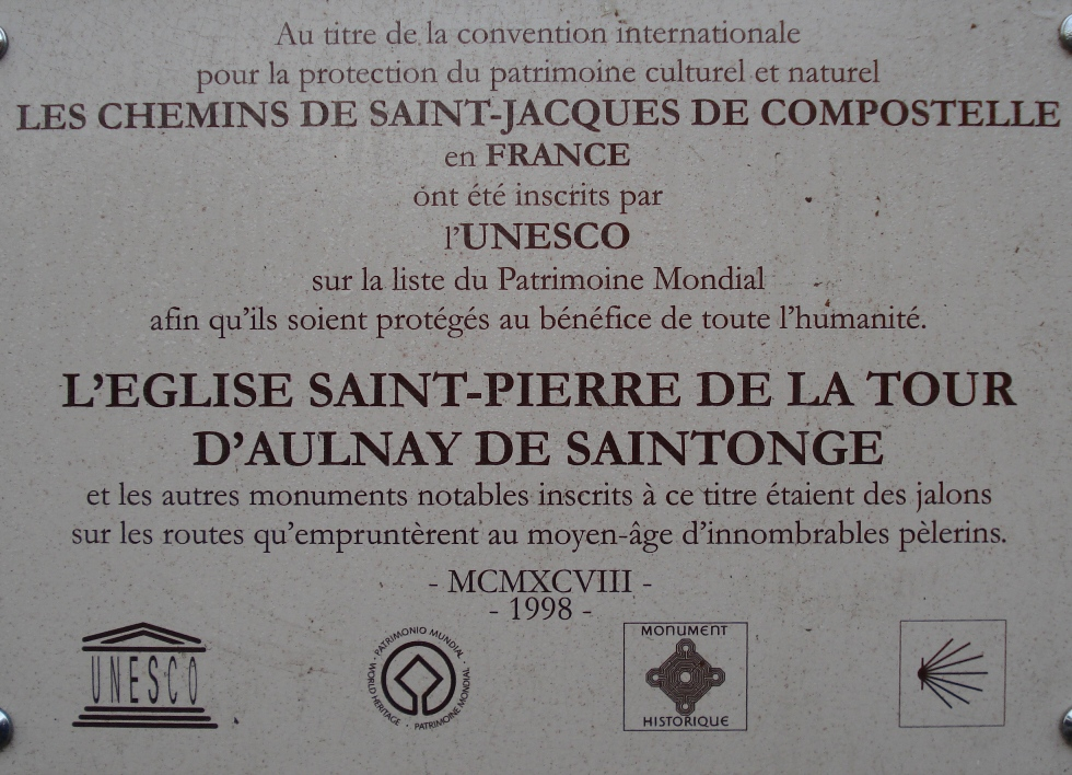 La Plaque présente à l'entrée de l'église